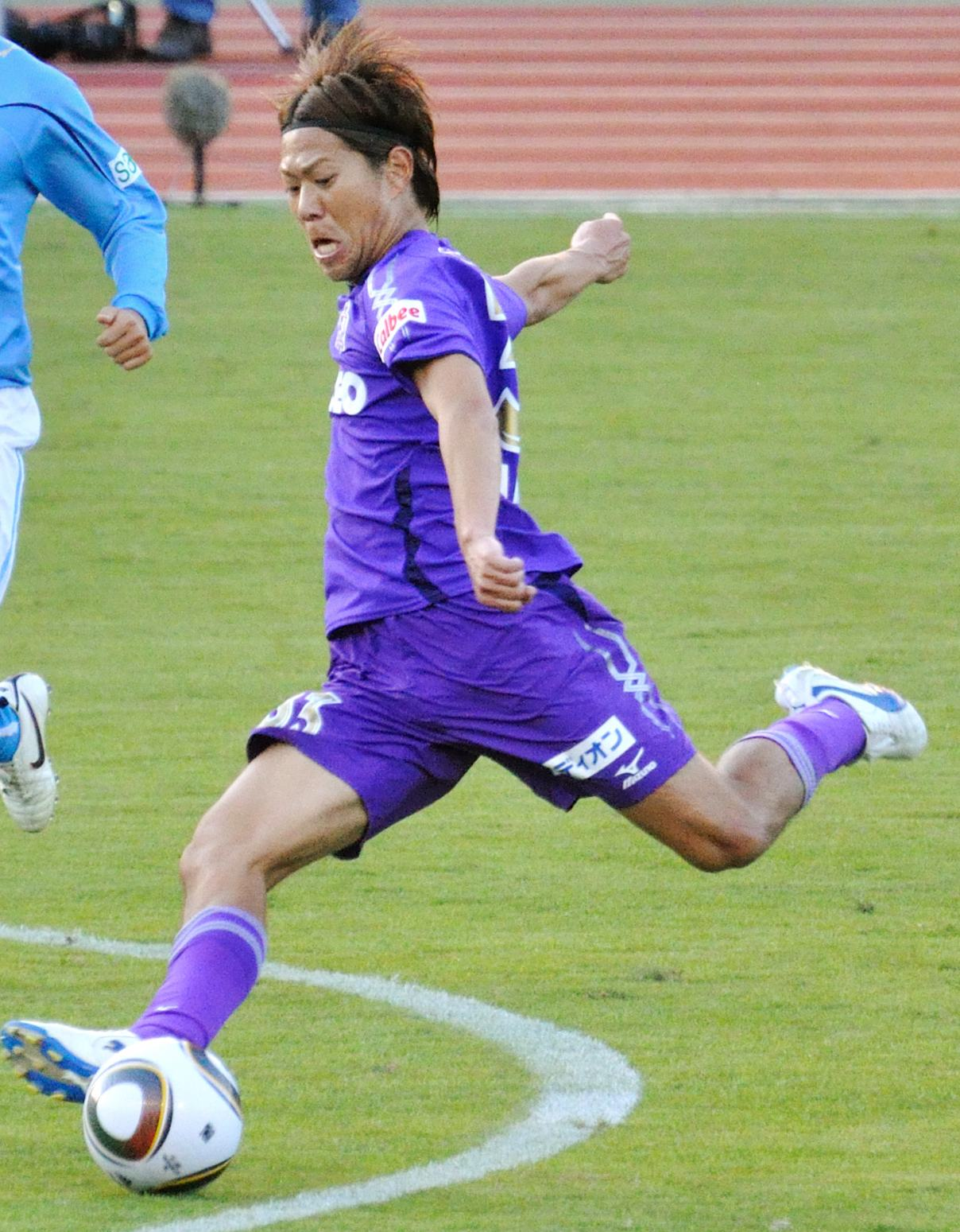 Masato Yamazaki DSC_7721